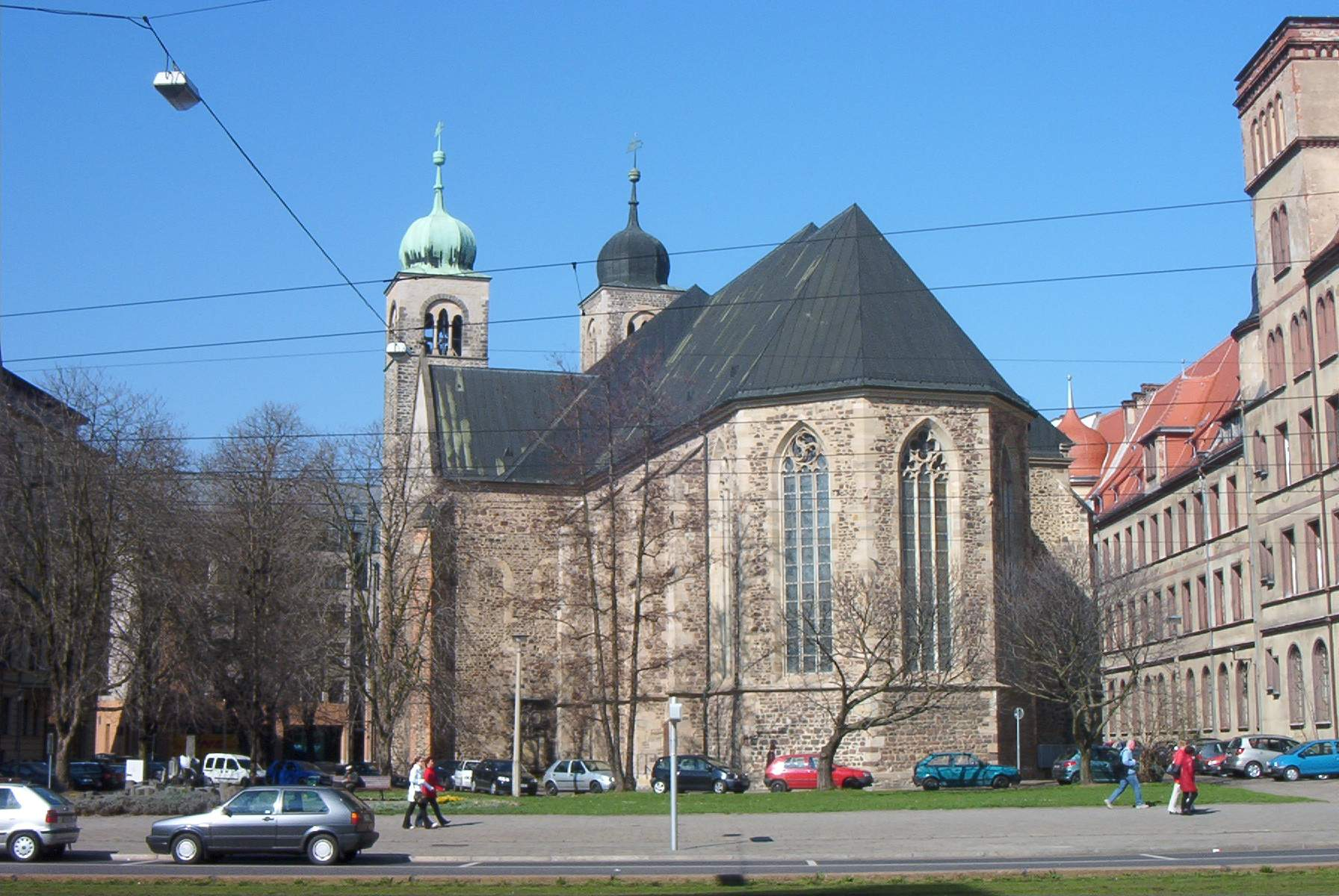 Sankt-Sebastian-Kirche Magdeburg, am 31.3.2005 selbst fotografiert, erteilte Lizenz: GNU-FDL